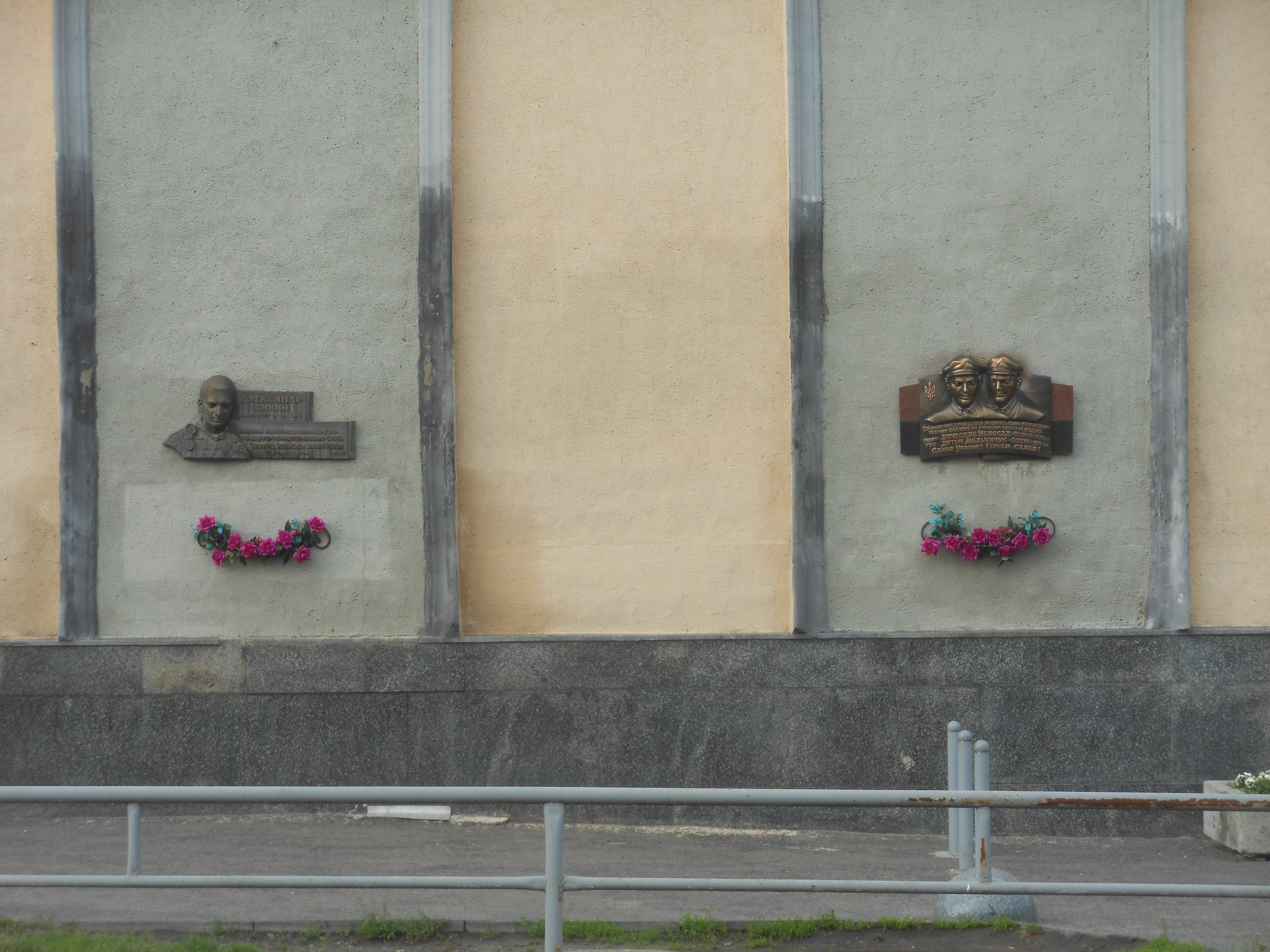 Житловий будинок — будинок, в якому була проголошена Радянська влада в Луцьку, Луцьк, вул. Лесі Українки, 2